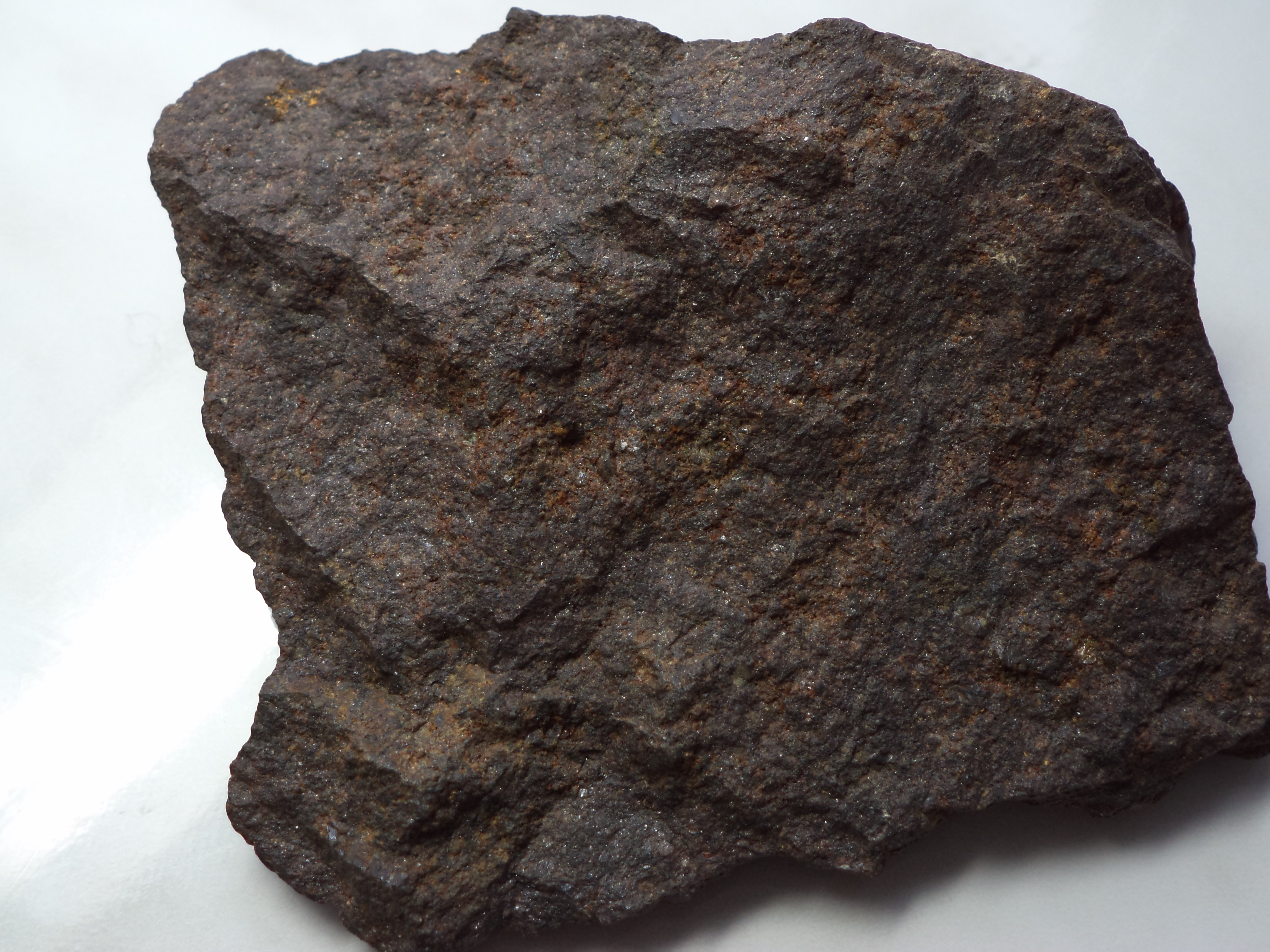 Осколок метеорита Сухий лиман, знайденого у 1987 році біля м. Одеса. Тип метеорита: хондрит (H4-5).